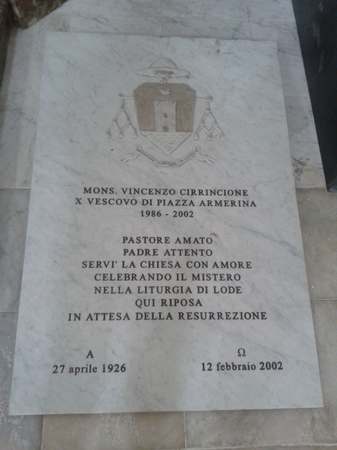 La tomba di S.E. Mons. Vincenzo Cirrincione